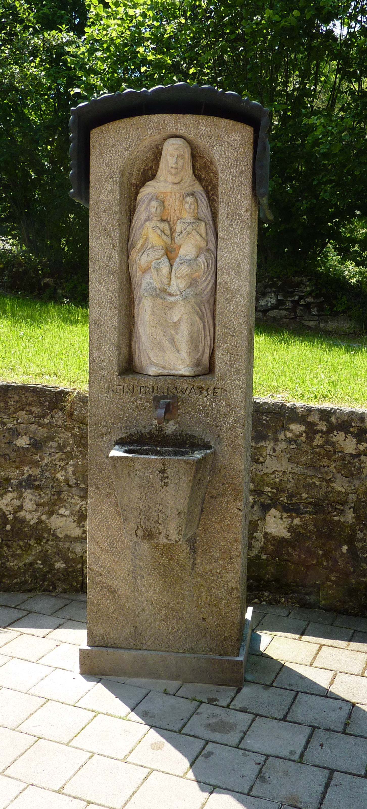 Wasserspender bei der St.-Anna-Kapelle in Mulfingen, heute als "kein Trinkwasser" deklariert, früher als heilkräftige Quelle beliebt